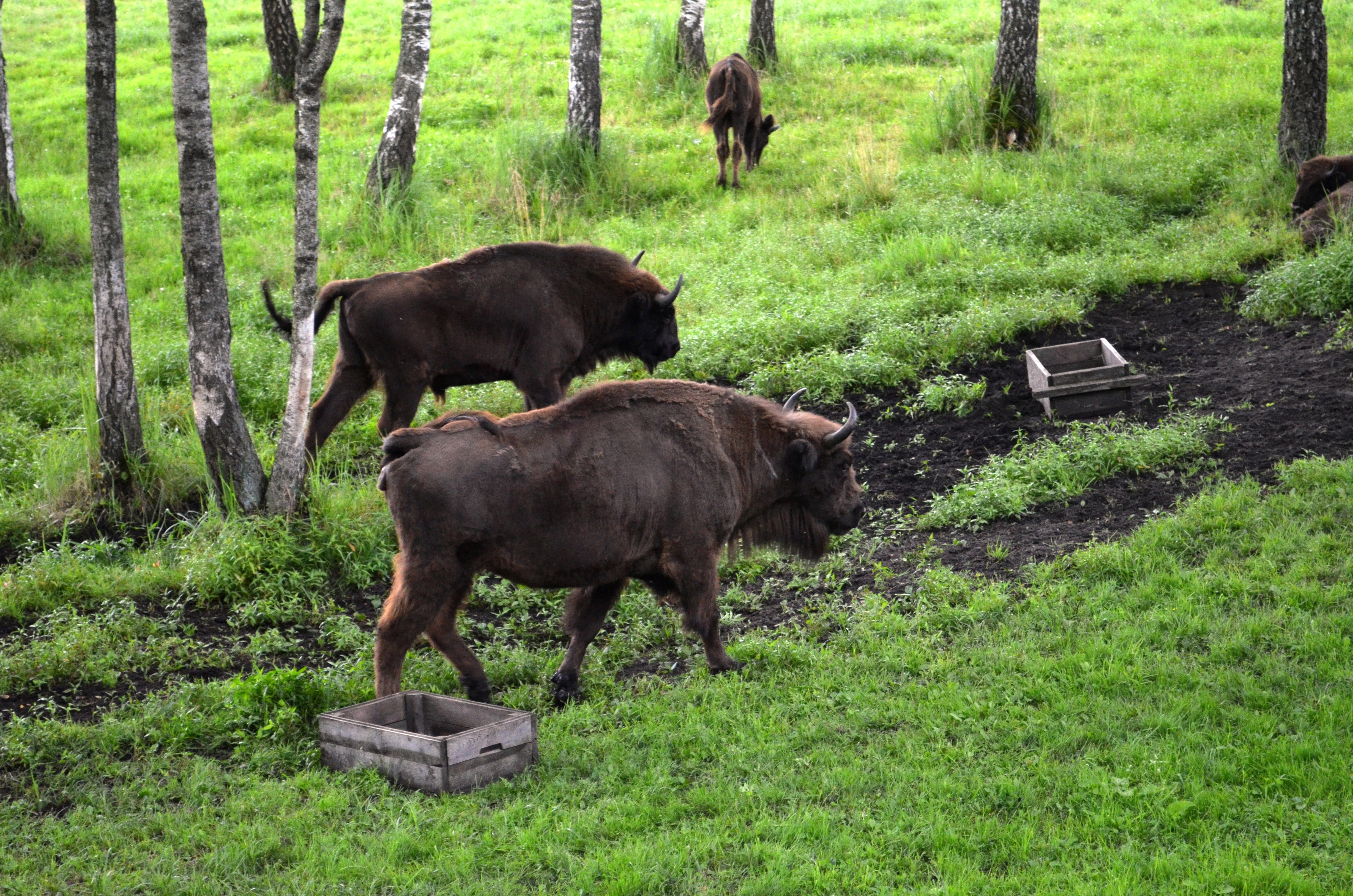 Pašilių stumbrynas, Panevėžio raj.